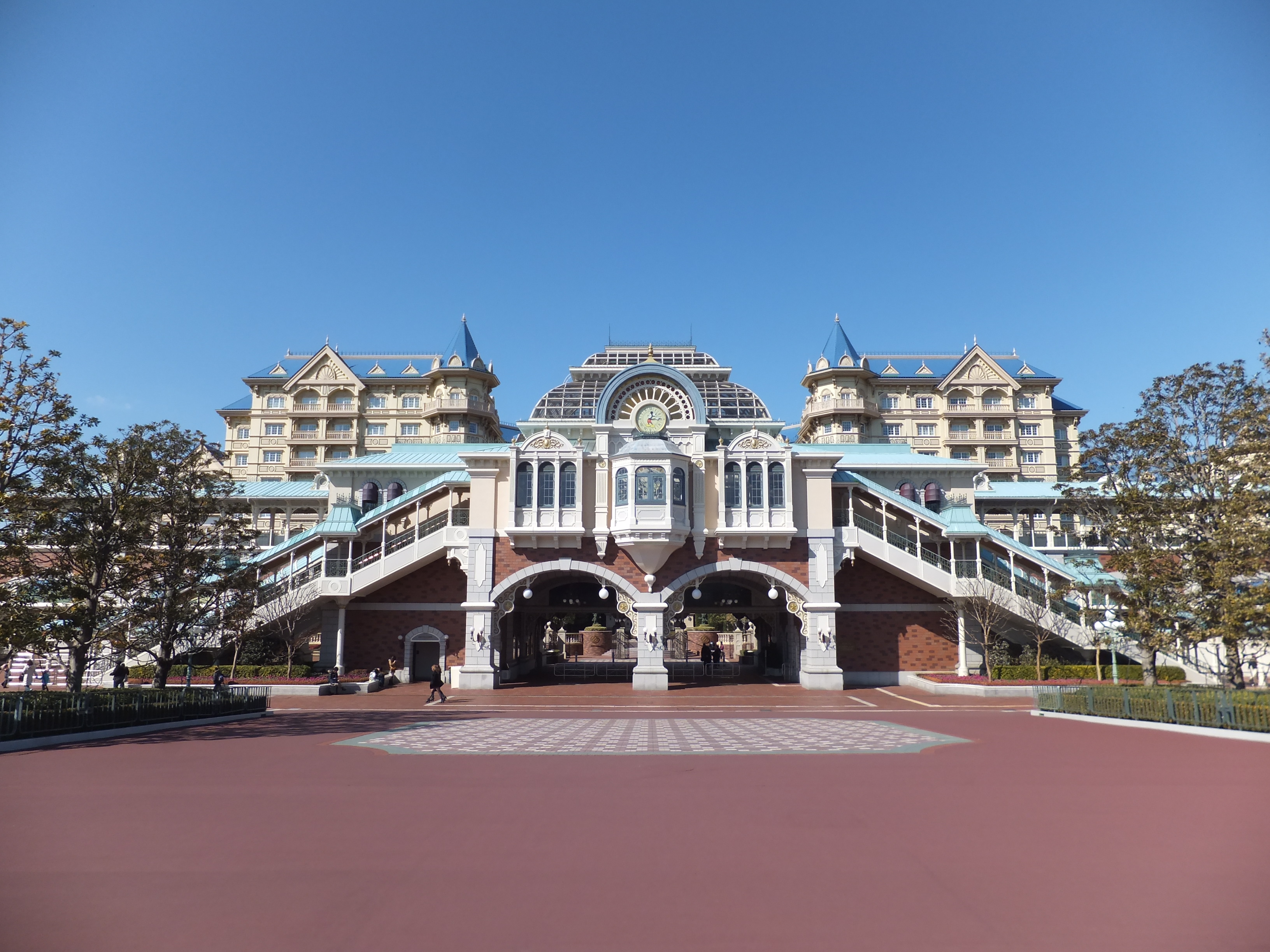 ディズニーリゾートライン東京ディズニーランド・ステーション駅、ディズニーランド正面エントランス側から